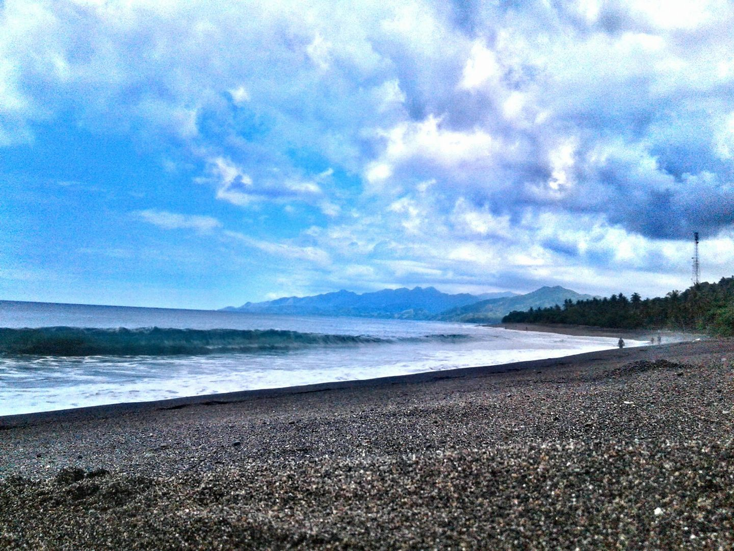 Pantai Desa Watutedang